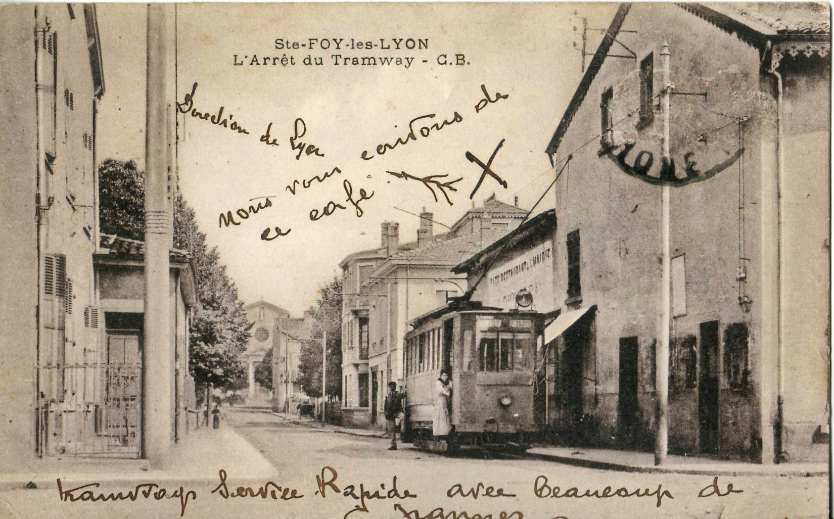 Carte postale ancienne éditée par G. B. :SAINTE-FOY-LÈS-LYON - L'Arrêt du Tramway